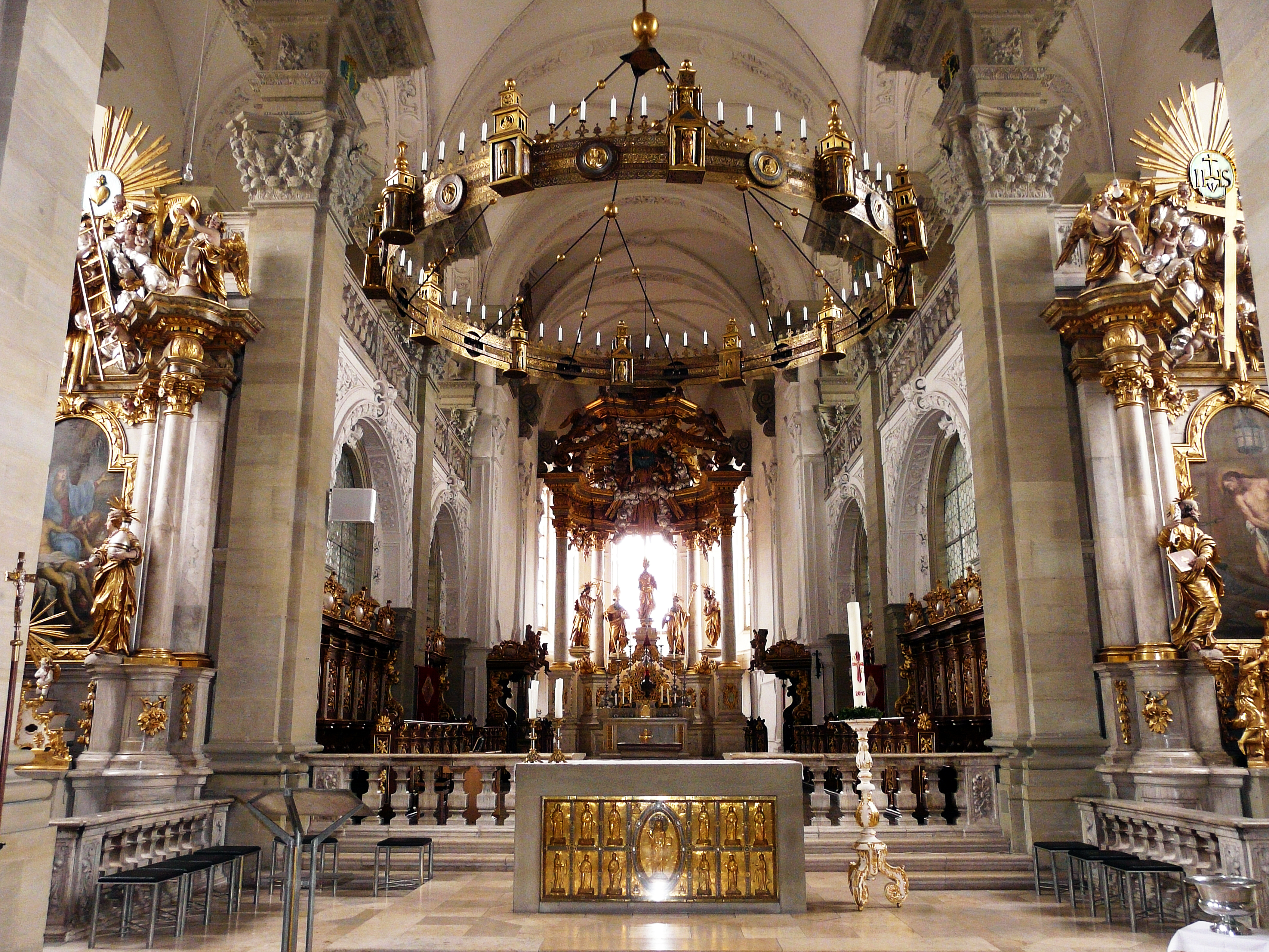 Монастырская церковь